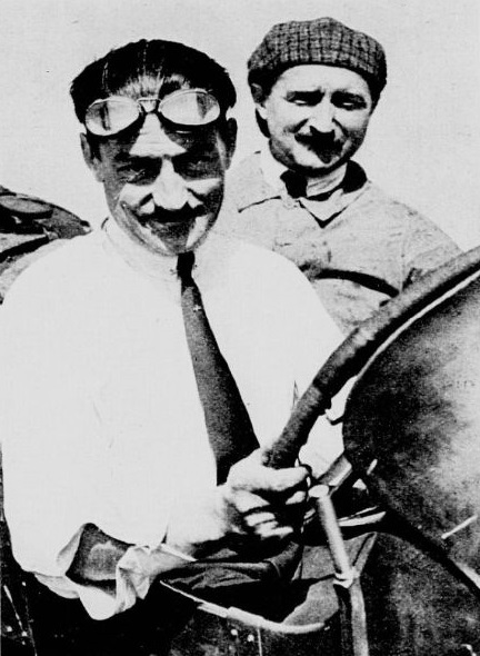 André Boillot, vainqueur de la Coppa Florio en 1922 sur Peugeot aux Madonies Le Monde illustré du 25 novembre 1922, p.441